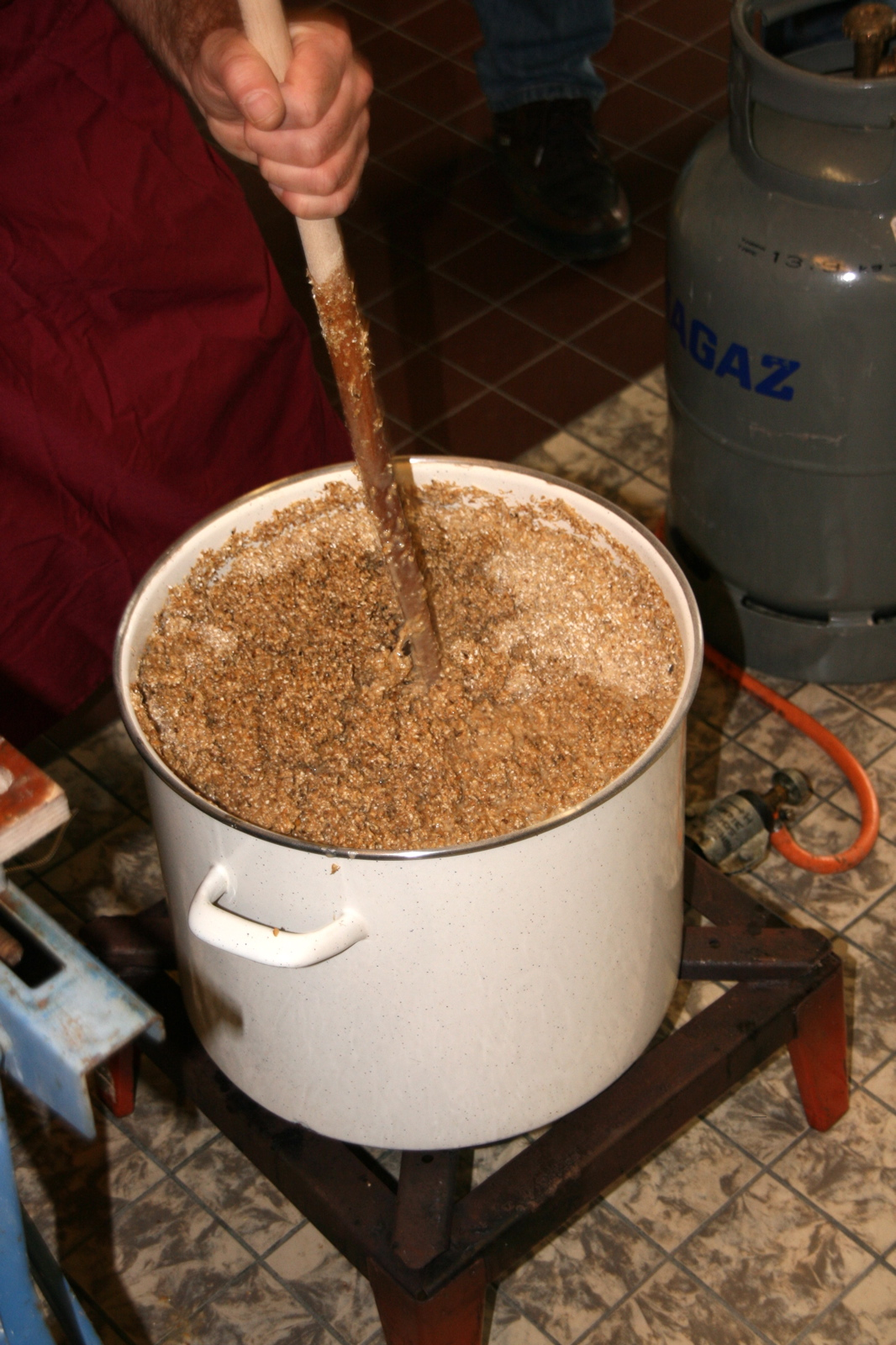 Description brouwen van bier Date18 November 2006SourceOwn workAuthorStinkzwamPermission (Reusing this file) GFDL eigen werk brouwen van bier